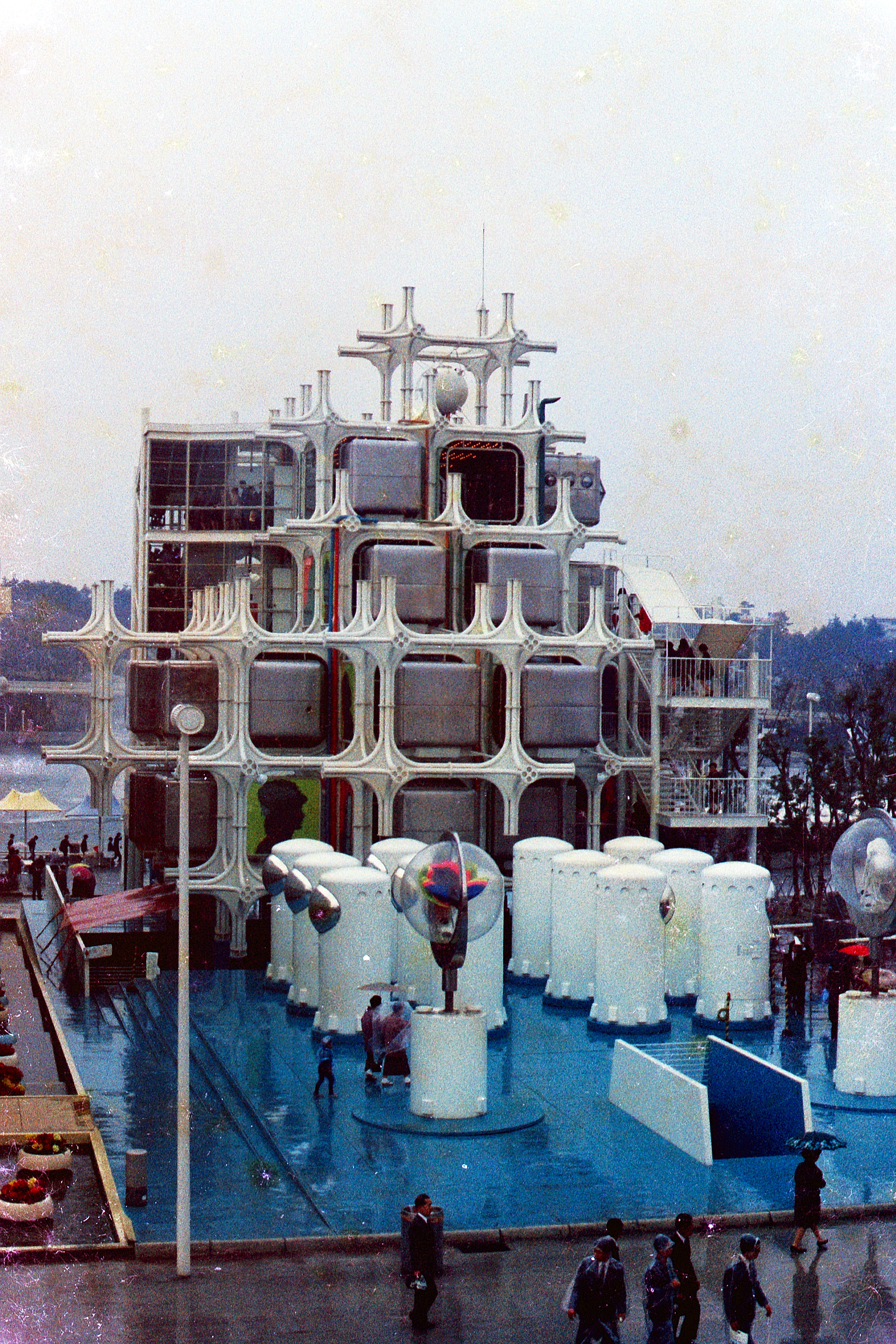 April 1970, Osaka Expo'70